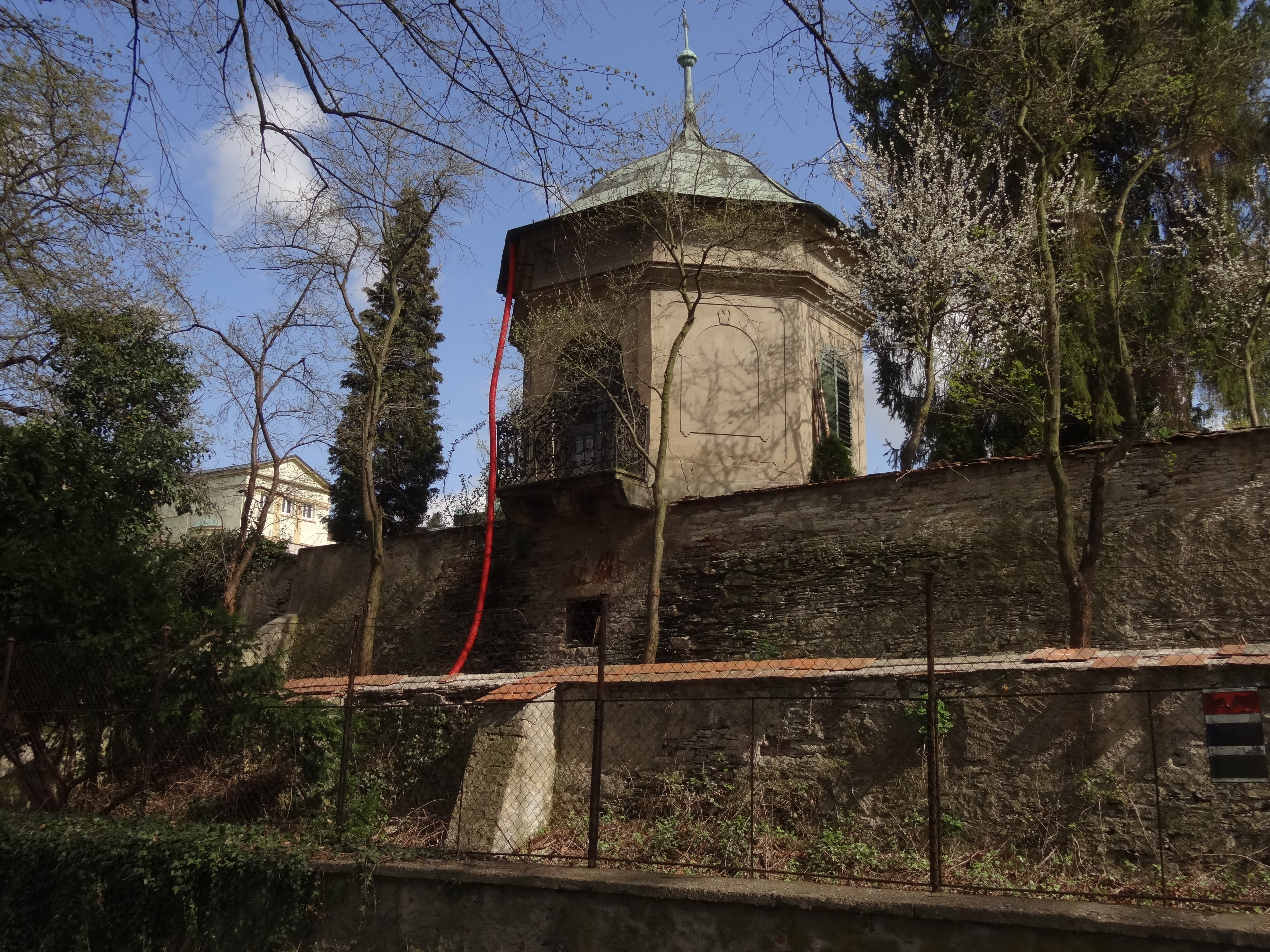 Gloriet a terasa se schodištěm, Husova u čp. 141, st. 74, pp. 75/1, Poděbrady II, Poděbrady.